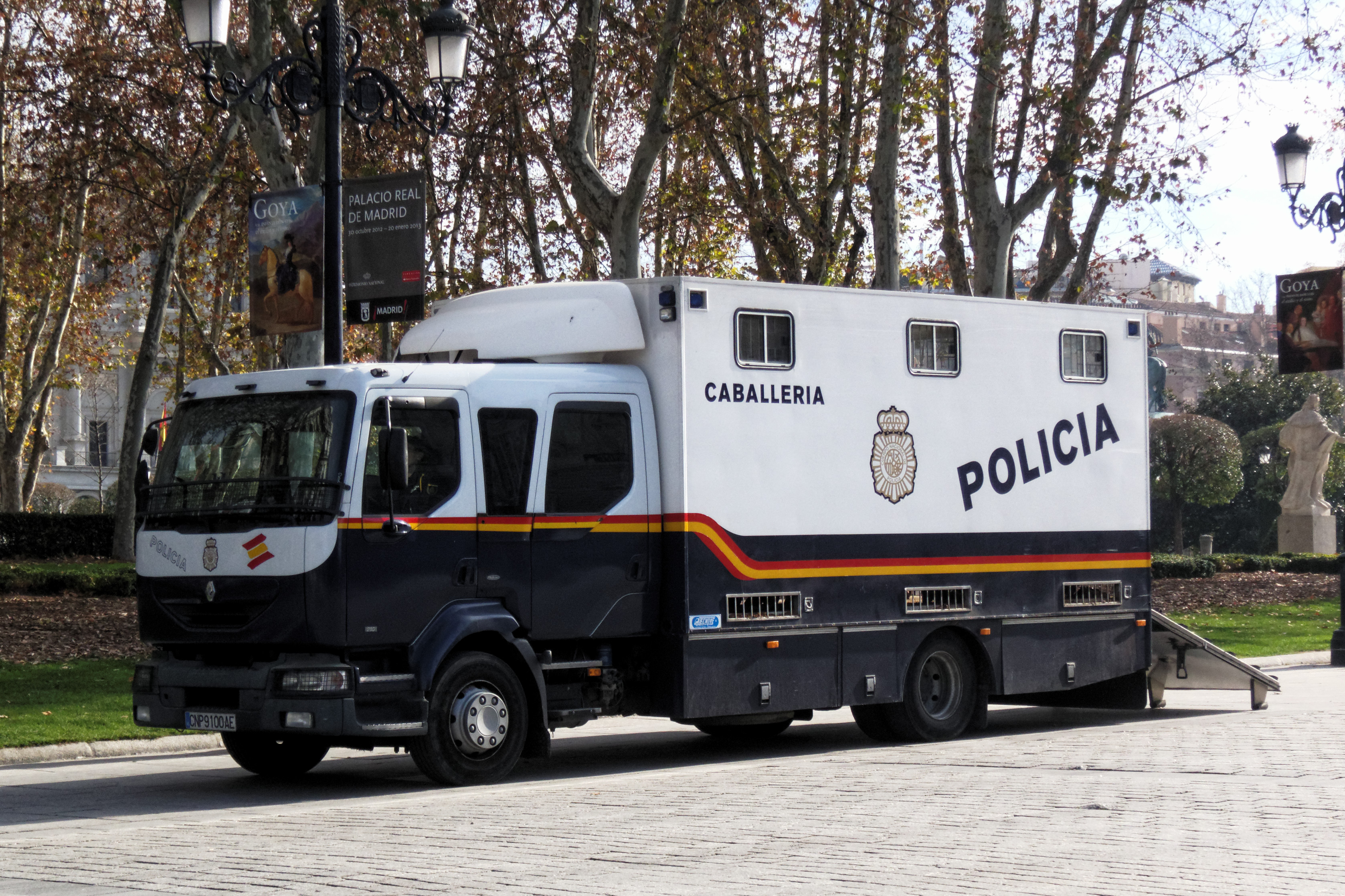 Camión de transporte de equinos de la caballería de la Policía Nacional española en Plaza de Oriente, Madrid.